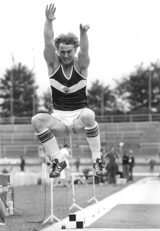 Lutz Dombrowski ADN-ZB Häßler 5.7.80 Dresden: Lutz Dombrowski (SC Karl-Marx-Stadt-Foto) egalisierte bei Leichtathletik-Wettbewerben in Dresden mit 8,45 m den Weitsprung -Europarekord des Jugoslawen Nanad Stekic aus dem Jahre 1975 und verbesserte die DDR-Rekordmarke von Frank Paschek um neun Zentimeter. Er erzielte die Weite bei zulässigem Rückenwind von 1,9 m-s im fünften Versuch. Seine bisherige Bestleistung stand bei 8,31 m.